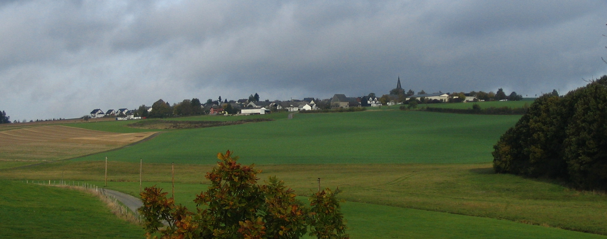 Südostansicht von Riegenroth/Hunsrück